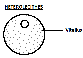 ceci est un schéma d'un type d'oeuf.